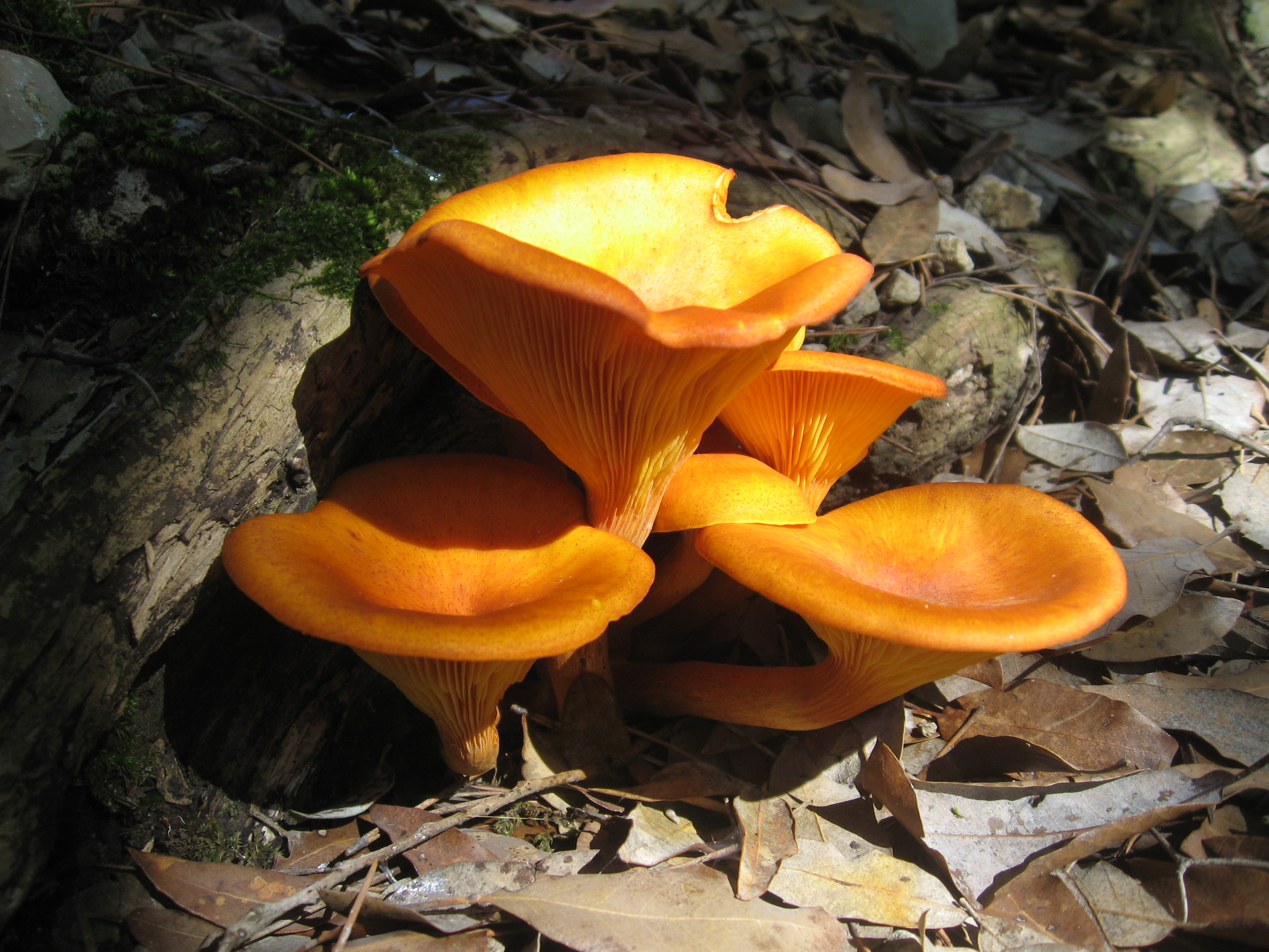 Omphalotus olearius, Mallorca